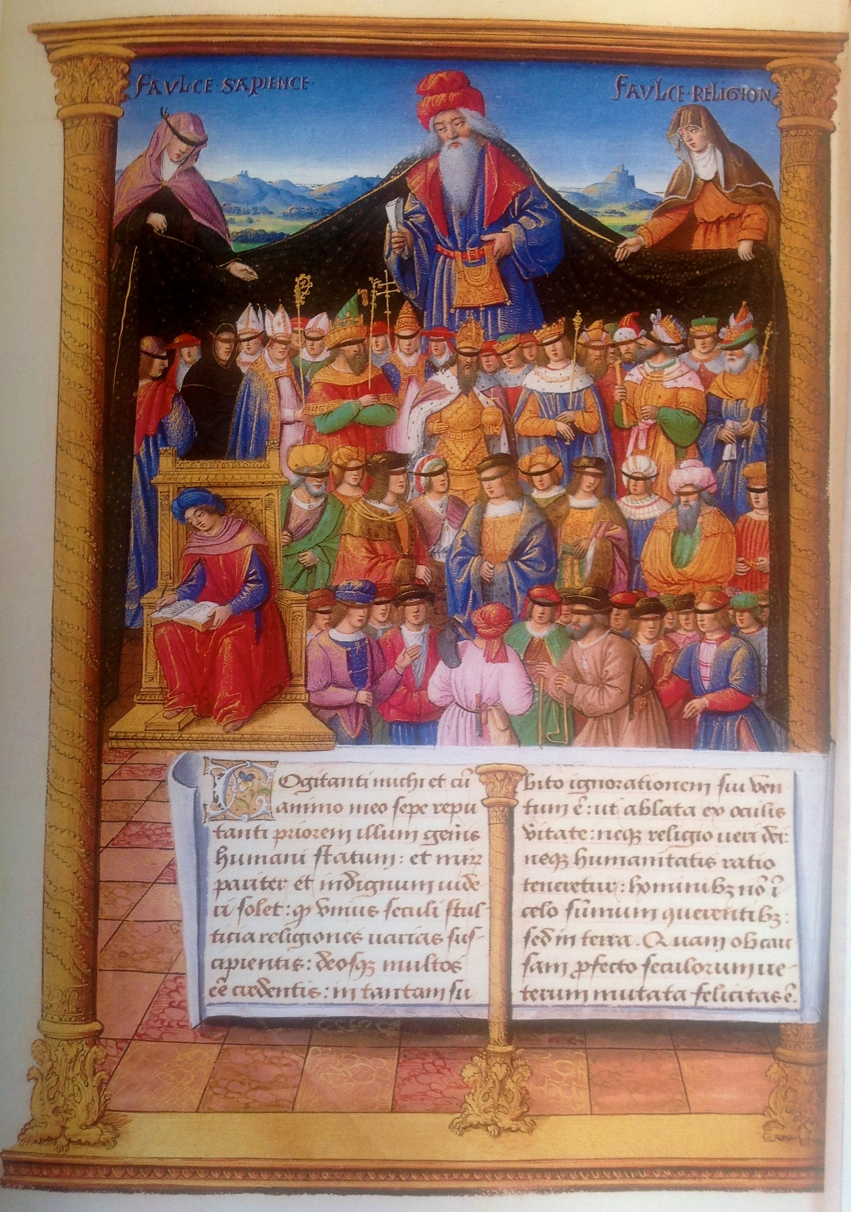 BnF-Lat1671- Lactance, Institutiones divinae, fol. 93v, enluminure du Maître de la Chronique scandaleuse